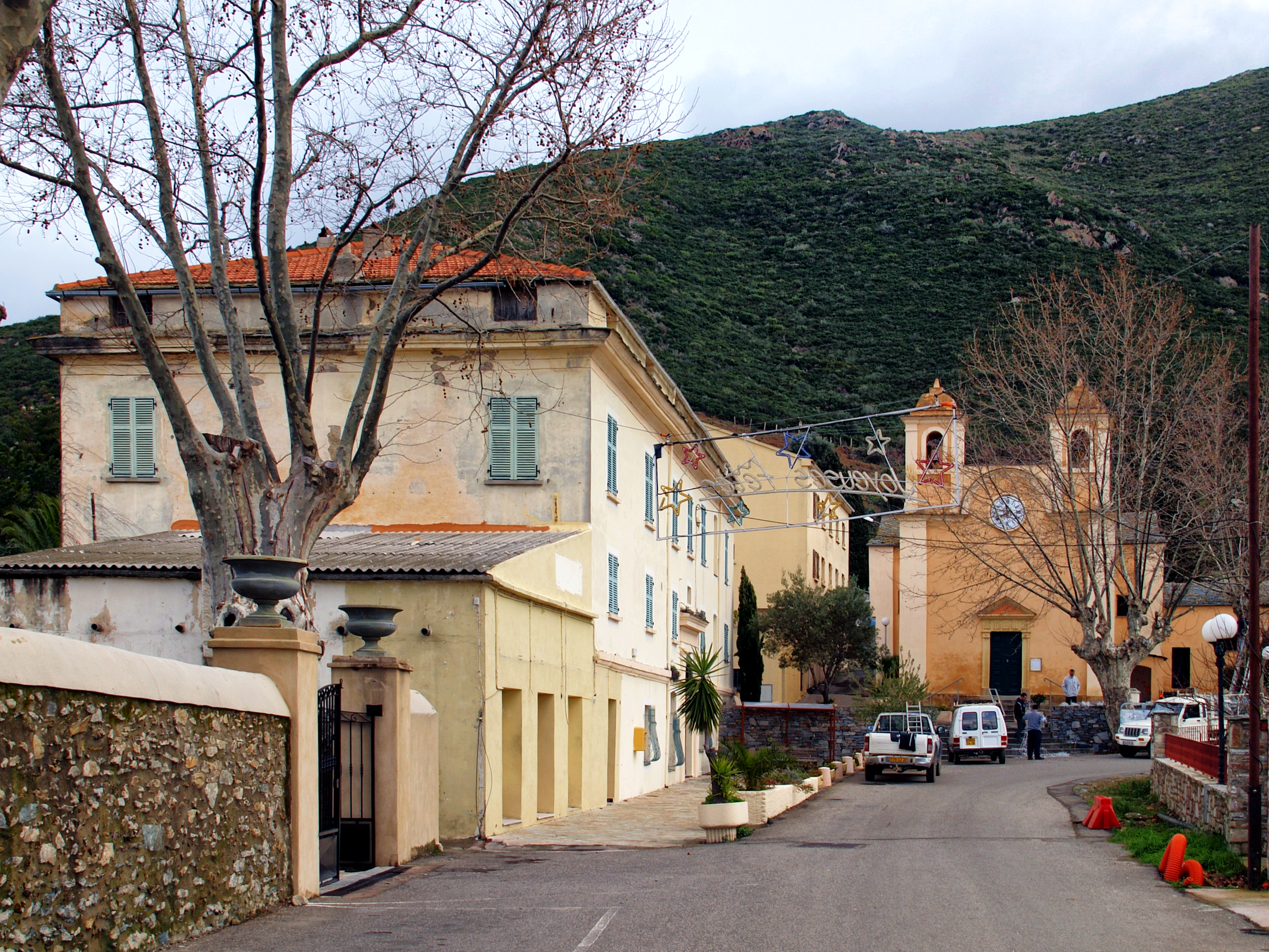 Olmeta-di-Tuda, Nebbio (Corse) - Centre du village. Sur la gauche la maison natale de Jean Casale, illustre aviateur de la chasse en 1914-1918. Au fond, l'église paroissiale Sainte-Marie